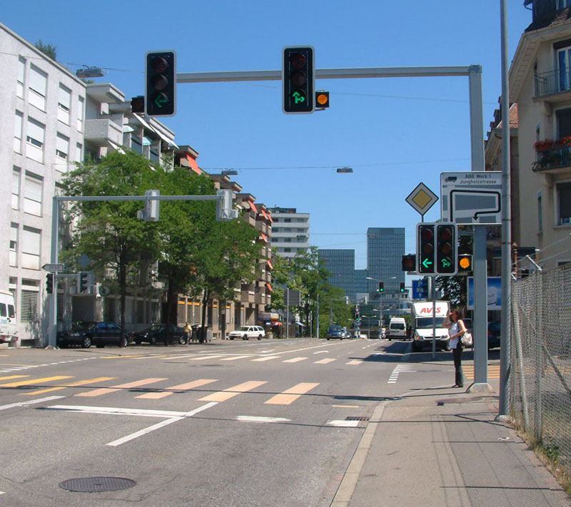 Blick Richtung Sunrise-Towers